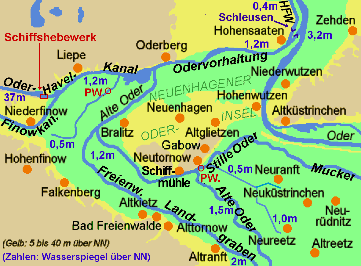 Übersichtskarte Neuenhagener Insel